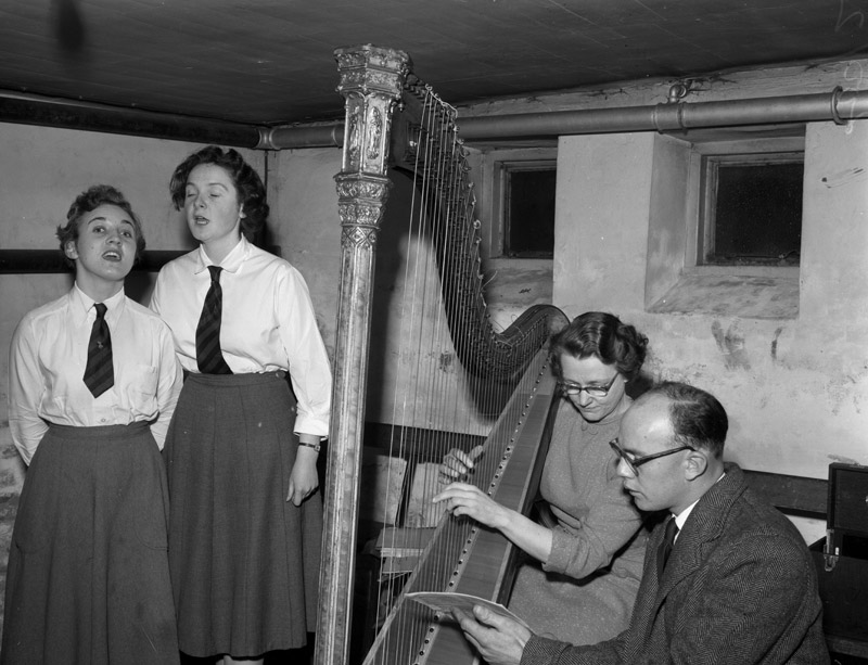 Teitl Cymraeg/Welsh title: Gŵyl Gerdd Dant Cymru yn Hen Golwyn, 1958 Ffotograffydd/Photographer: Geoff Charles (1909-2002) Dyddiad/Date: 20/11/1958 Cyfrwng/Medium: Negydd ffilm / Film negative Cyfeiriad/Reference: (gch19730) Rhif cofnod / Record no.: 3470114 Rhagor o wybodaeth am gasgliad Geoff Charles yn Llyfrgell Genedlaethol Cymru More information about the Geoff Charles Collection at the National Library of Wales Mae ffotograffau Geoff Charles hefyd yn rhan o Broject Europeana Libraries Geoff Charles' photographs also form part of the Europeana Libraries Project